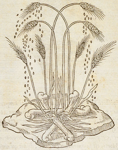 Spes altera vitae